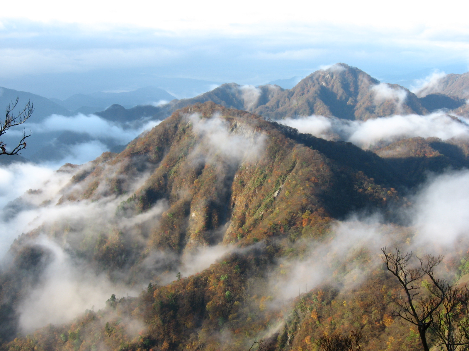 蛭ヶ岳より臼ヶ岳